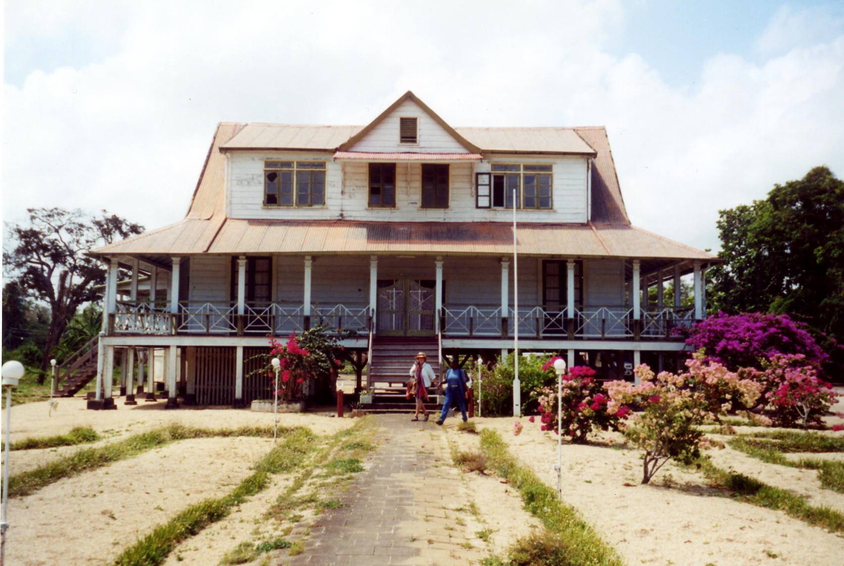 Der Amtssitz des Distriktkommissars in Friendship.